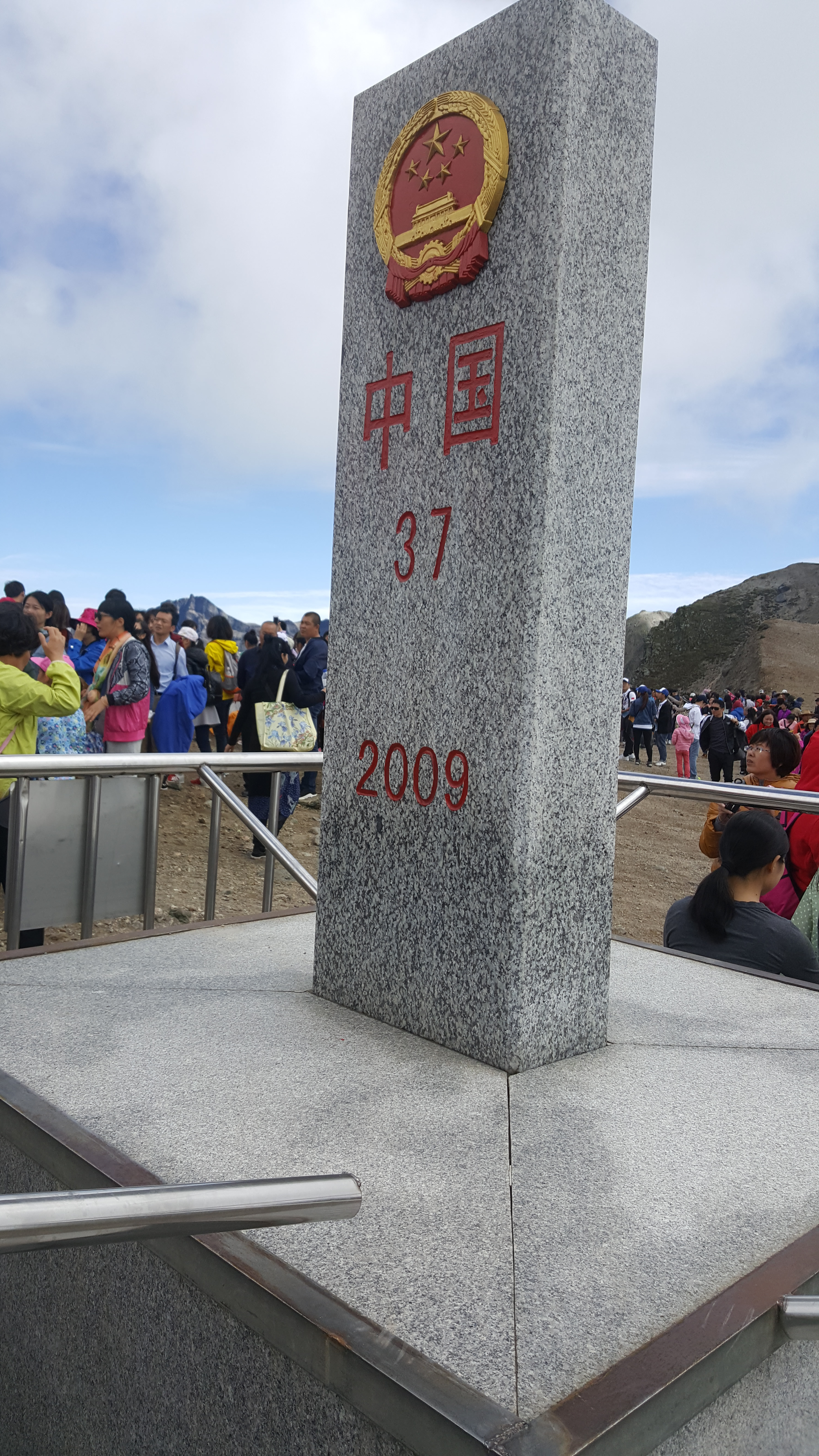 中文（中国大陆）: 长白山中朝37号界碑